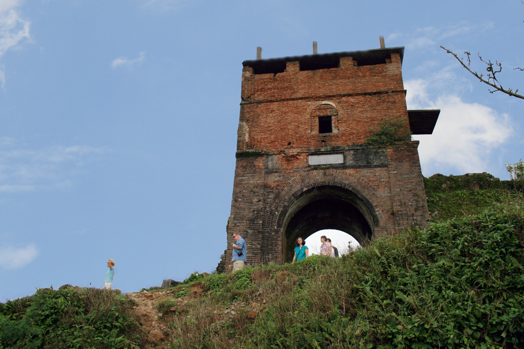 Hải Vân Quan: trên đèo Hải Vân, có hai cửa ải, một cửa khắc chữ "Hải Vân Quan" (關雲海), cửa thứ hai khắc chữ "Thiên hạ đệ nhất hùng quan" (關雄一第下天)